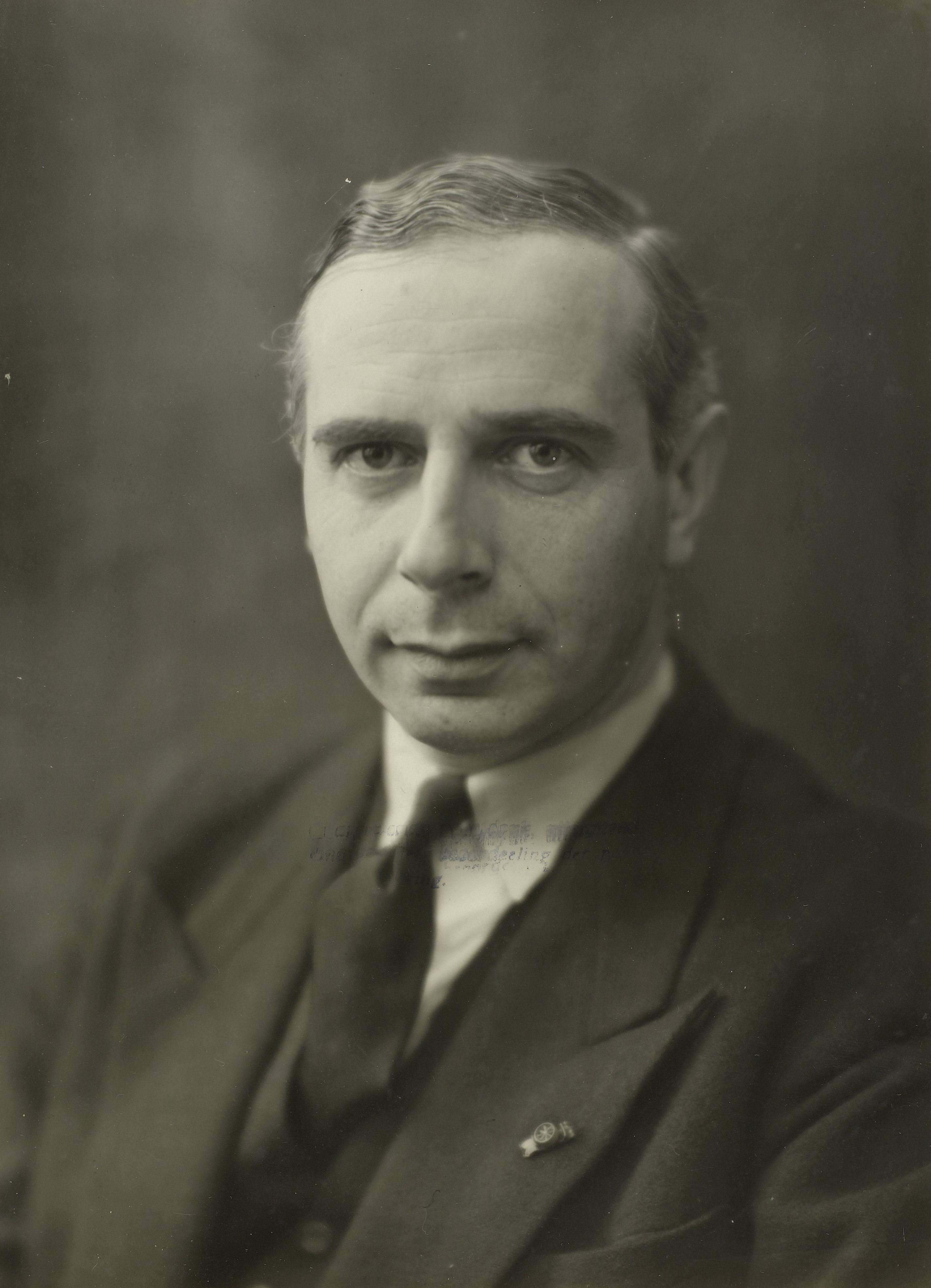 IdentificatieTitel(s): Portret van Pètrus Jan Rienstra van Stuyvesande (1905-1980)Objecttype: foto Objectnummer: RP-F-2007-52Opschriften / Merken: signatuur, verso, stempel: ‘[...] ATELIER J. MERKELBACH [...]’VervaardigingVervaardiger: fotograaf: Jacob MerkelbachPlaats vervaardiging: NederlandDatering: ca. 1930 - ca. 1940Fysieke kenmerken: ontwikkelgelatinezilverdrukMateriaal: papier fotopapier karton Techniek: ontwikkelgelatinezilverdrukAfmetingen: h 228 mm × b 165 mmOnderwerpWie: Pètrus Jan Rienstra van StuyvesandeVerwerving en rechtenCredit line: Schenking van mevrouw J.J.E. van Campen-de Lange, BlaricumVerwerving: schenking 2007Copyright: Publiek domein